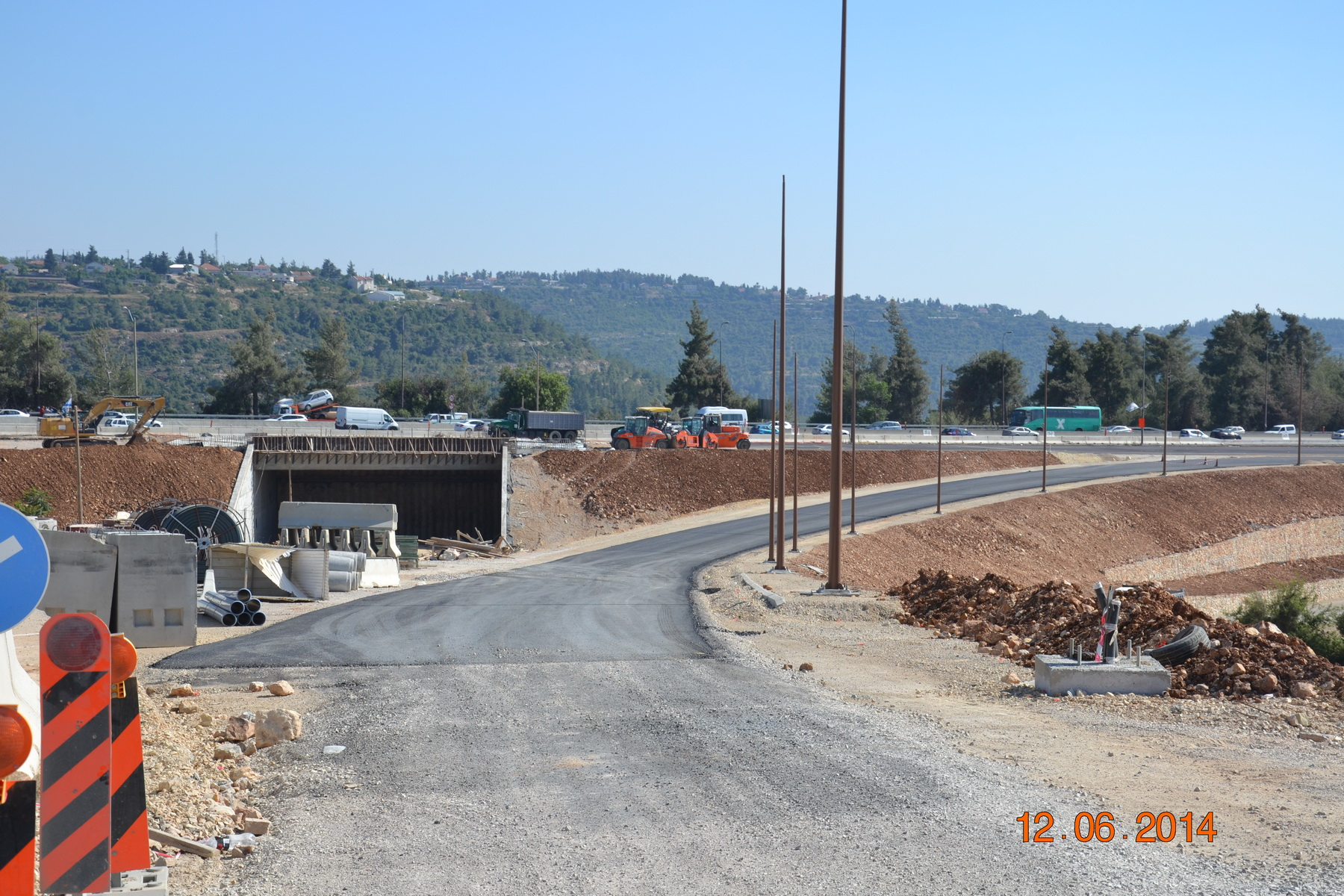 מחלף נווה אילן - היציאה לכיוון תל אביב, יוני 2014